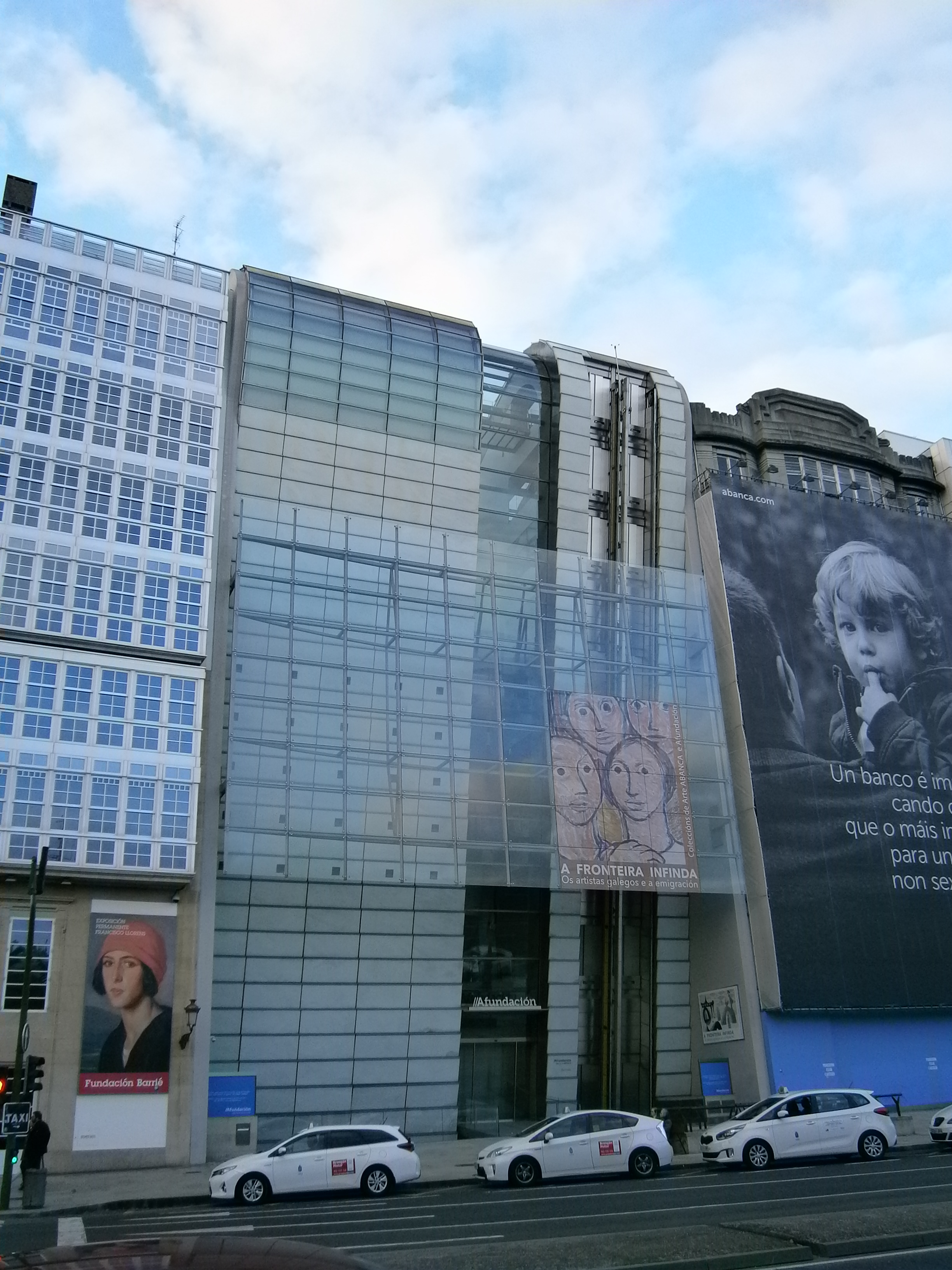 Sede de AFundación (Fundación Caixa Galicia) na Coruña